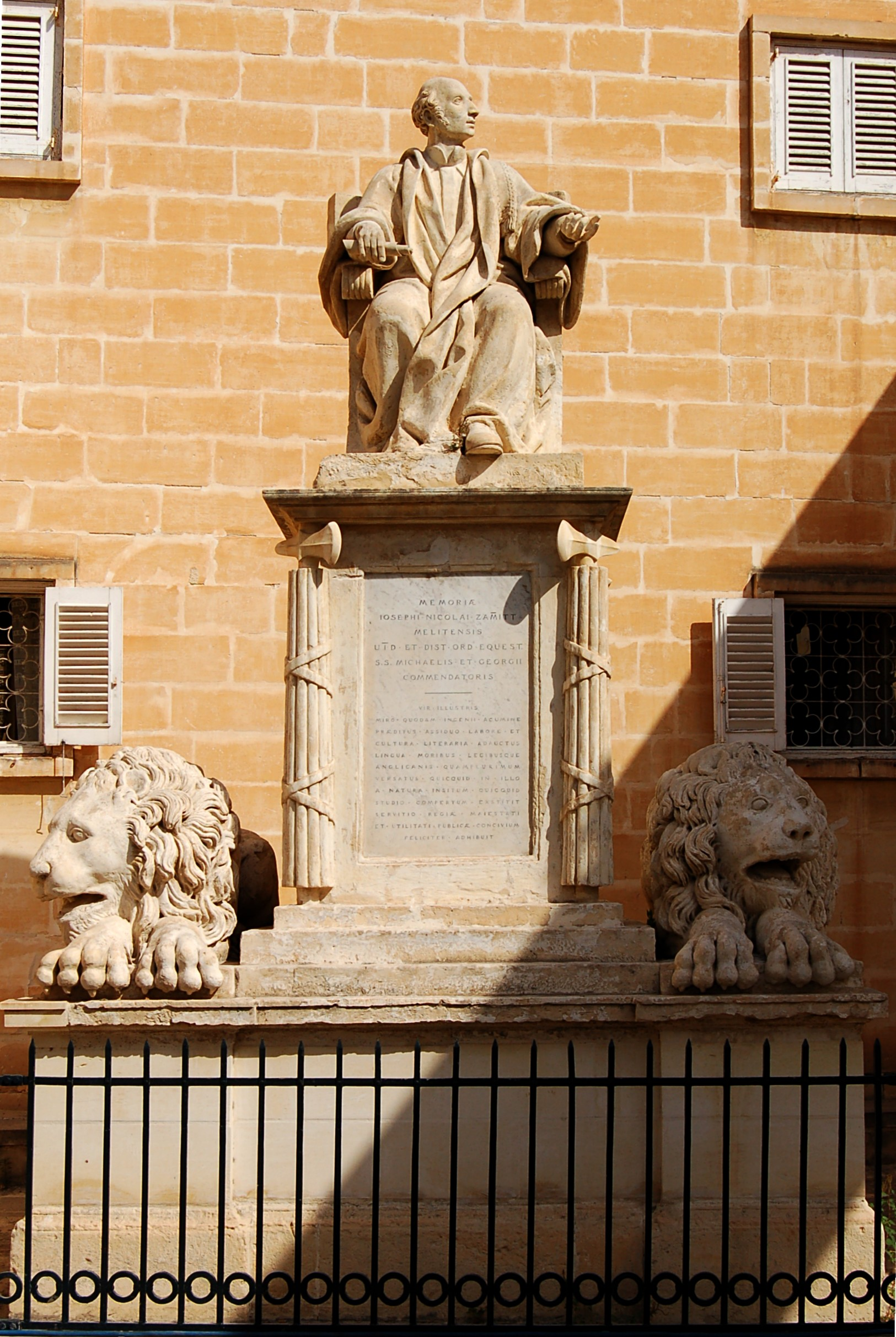 Monument to Joseph Nikola Zammitt in Upper Barrakka Gardens, Valletta, Malta